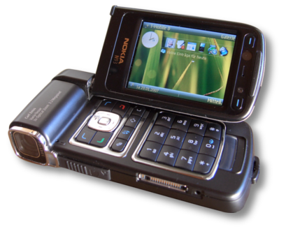 Nokia N93-1